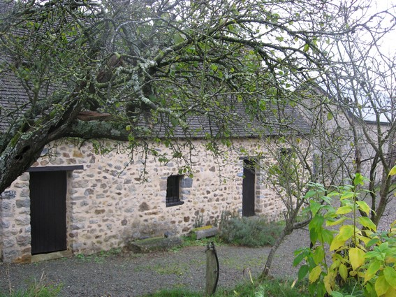 Vue de la Closerie des Poiriers, maison de Jean Chouan à Saint-Ouën-des-Toits, Mayenne, France